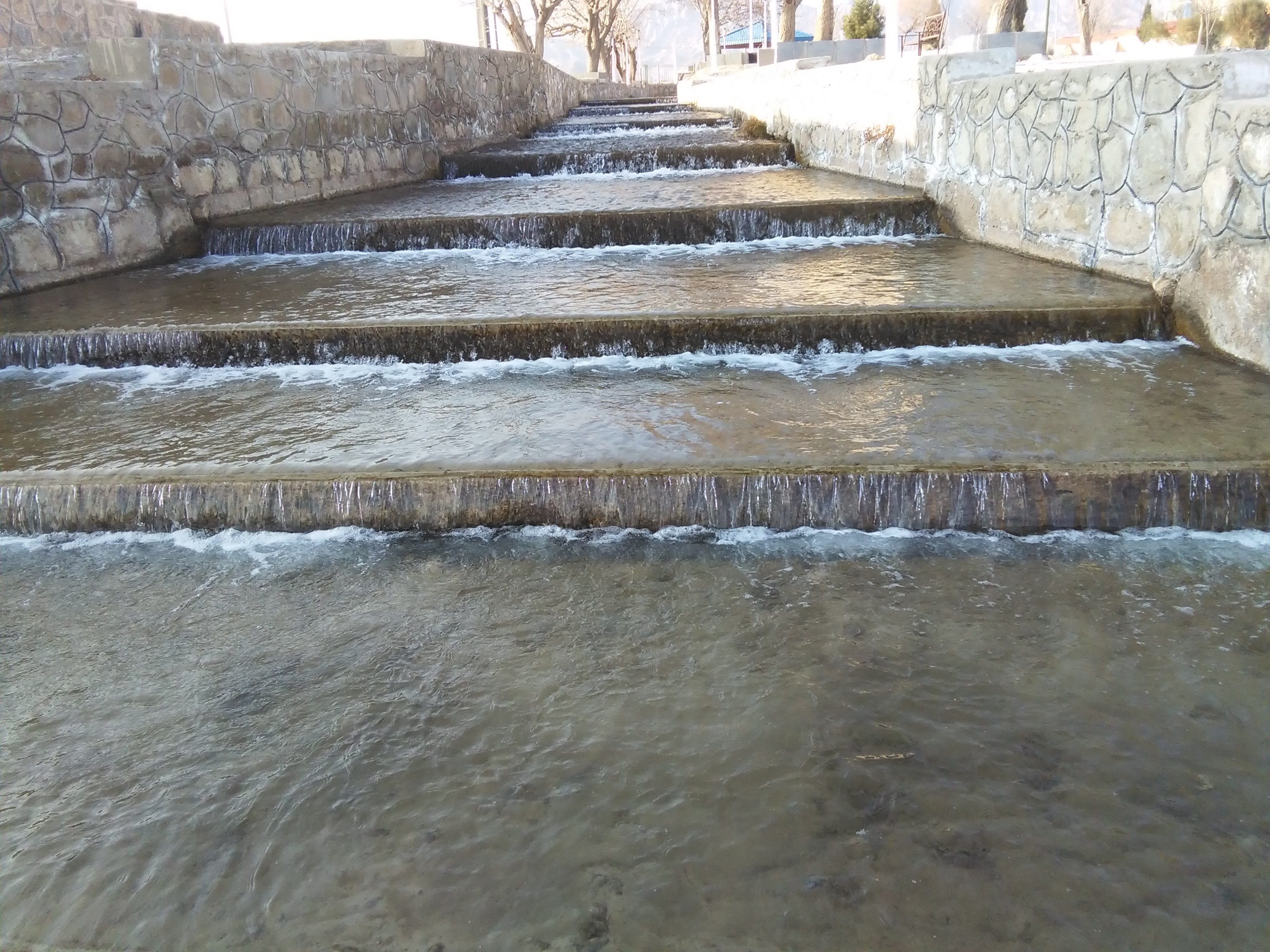 Golestan, Semnan, Semnan Province, Iran